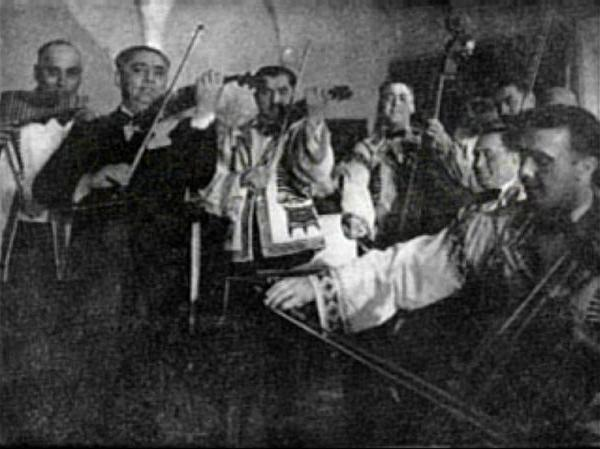 Un specatcol la care a cantat si Grigoras Dinicu